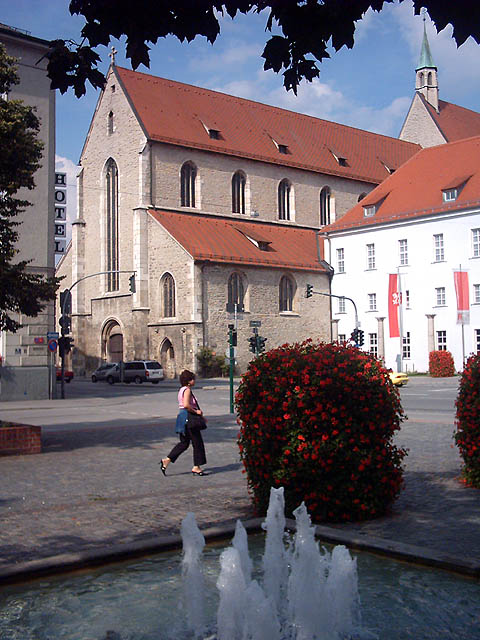 Regensburg (Bayern): Der Dachauplatz mit der Minoritenkirche im Hintergrund. Das Gebäude rechts ist das historische Museum. Bildautor: Peter Bubenik - Aufnahmedatum: 21.07.2004 - Lizenz: GNU-FDL Mehr Bilder aus Regensburg: Ein Abend an der Donau bei der Steinernen Brücke... Als in Regensburg noch Straßenbahnen fuhren - Modell des Arnulfsplatzes um ca. 1960 Meditieren auf Rengschburgerisch: Der Spitalgarten in Stadtamhof an der Steinernen Brücke Das Wohnhaus des Astronomen Johannes Kepler und seiner Familie von 1626-1628 Der Goldene Turm Die Neugestaltung des Neupfarrplatzes Mitte der 90er-Jahre fand nicht nur ungeteilte Zustimmung... Der Brückturm neben dem Salzstadel (2) Die historische Wurstküche ("Wurstkuchl") am Marc-Aurel-Ufer Dom St. Peter (2) Das Ostentor Das "Bruckmandl" (Brückenmännlein) in der Mitte der Steinernen Brücke Zeugl (bair. für "Aushängeschild") des historischen Lokals "Zum Walfisch" Regensburg (Bayern): Der Biergarten im Bischofshof neben dem Dom (2) Gedenktafel für Oskar Schindler, der nach dem Krieg in Regensburg wohnte Der fast überfüllte Bismarckplatz während des Bayerischen Jazzweekends 2004 Sitzung des Immerwährenden Reichstags in Regensburg im Jahr 1640 Dom